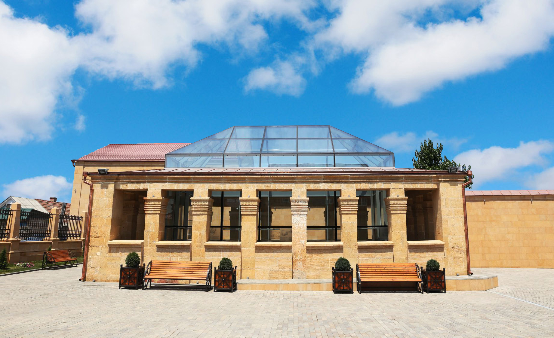 Домик Петра І в Дербенте